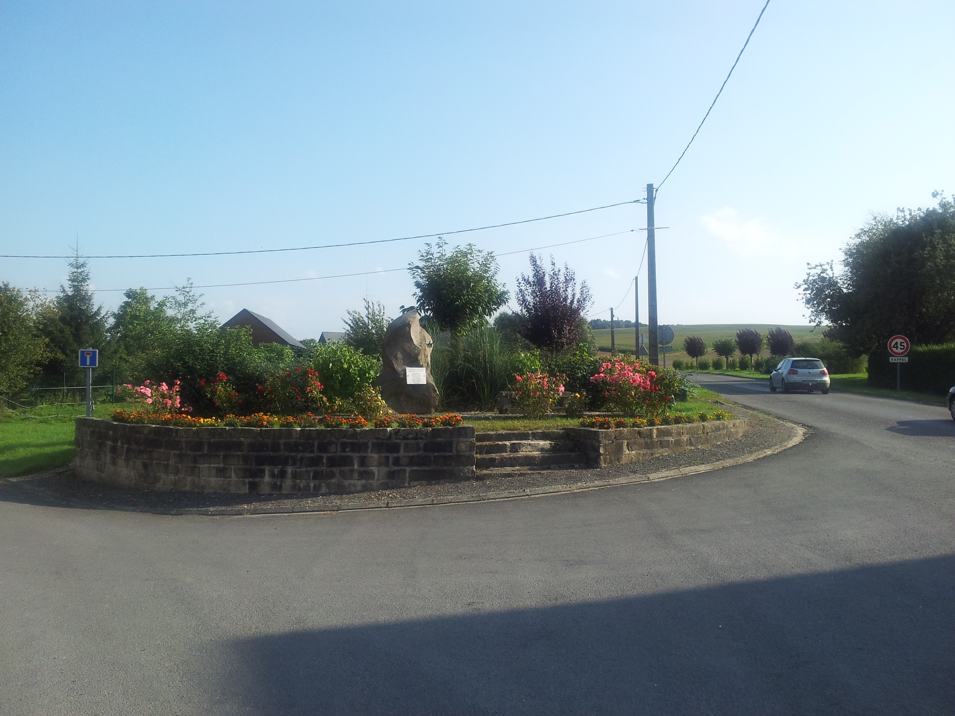 Monument aux morts de Voharies